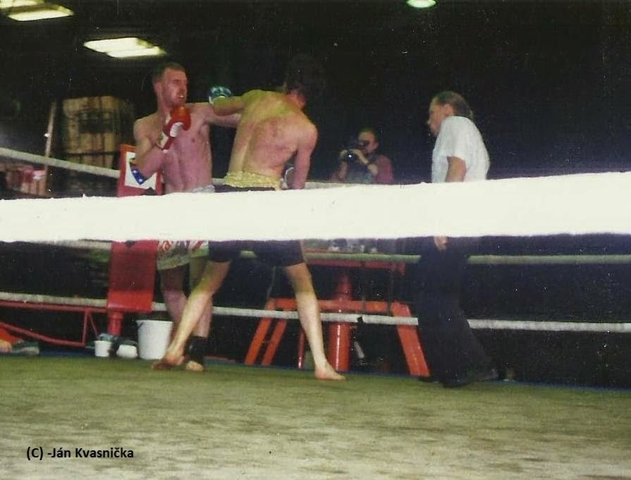 Prvý thai box zápas Slovesnkého thai boxera -Praha Brumlovaka Máj 1996